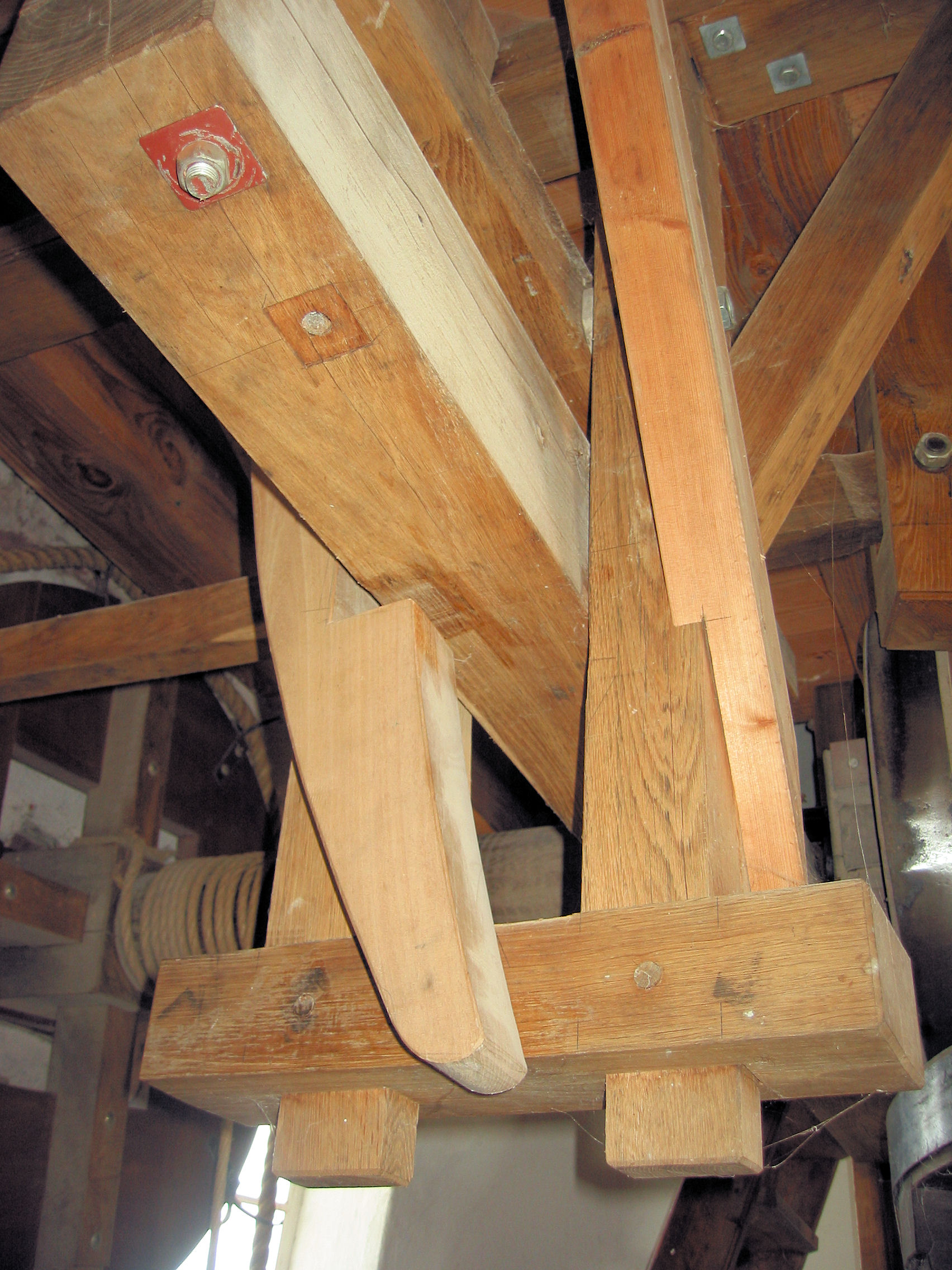 Vangbalk luiwerk van de molen Op Hoop Van Beter, Ingen, Gelderland, the Netherlands